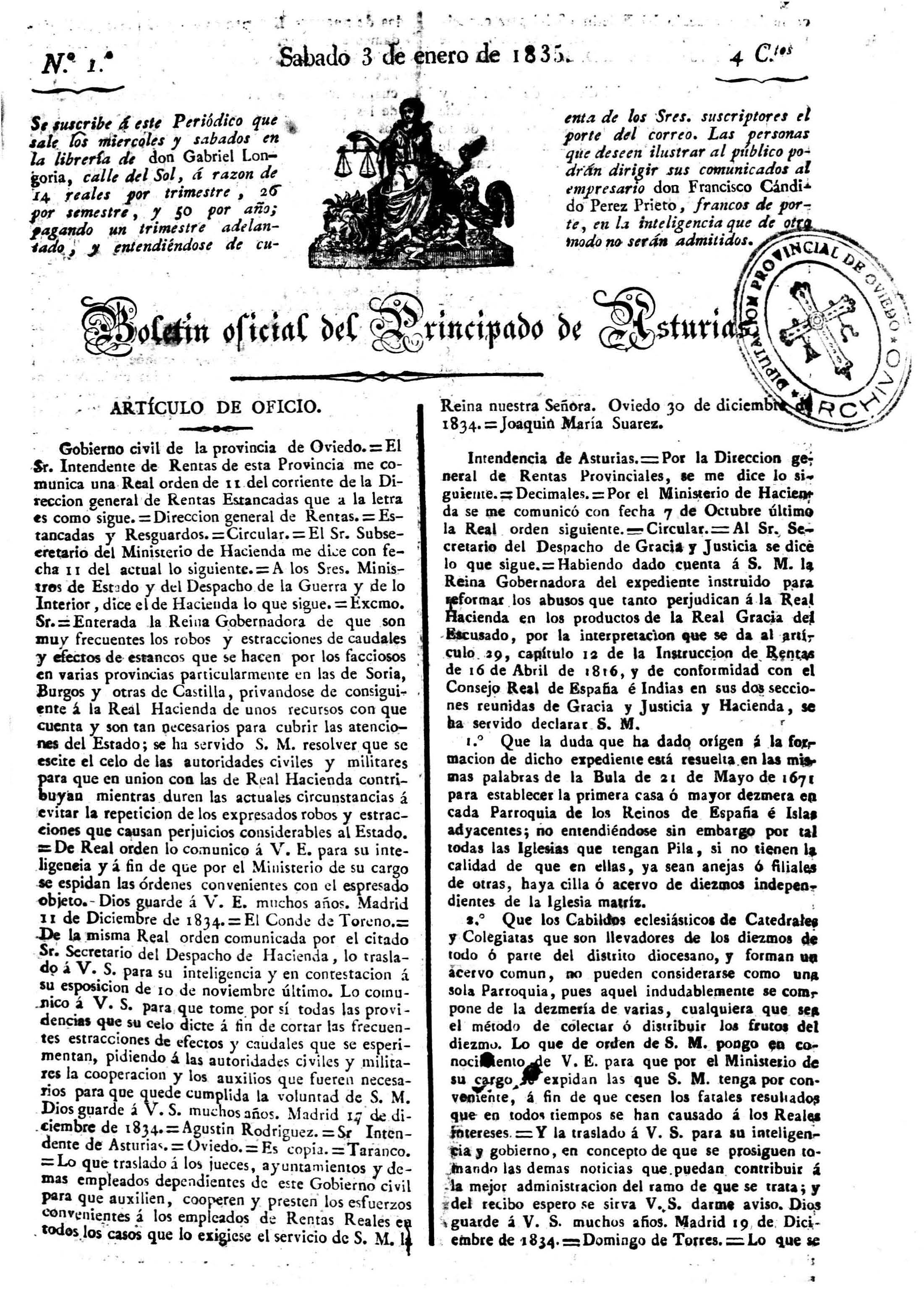 Portada del 1º número del BOPA (1835)